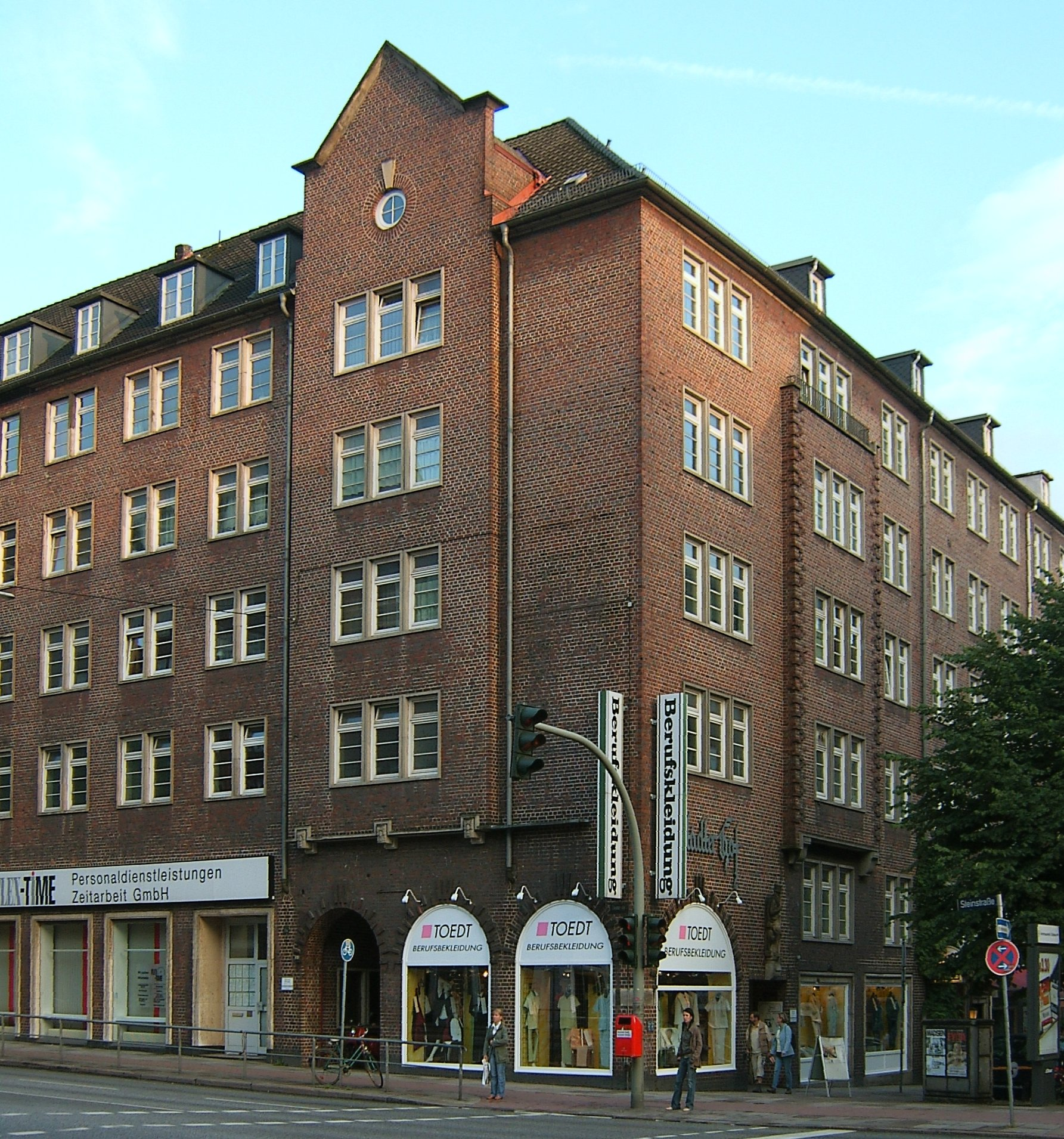 Der Altstädter Hof in Hamburg-Altstadt wurde 1936/37 nach Plänen von Rudolf Klophaus erbaut. Die Skulpturen stammen von Richard Kuöhl This is the photograph of an architectural monument. It is part of the list of cultural monuments of Hamburg, no. 684